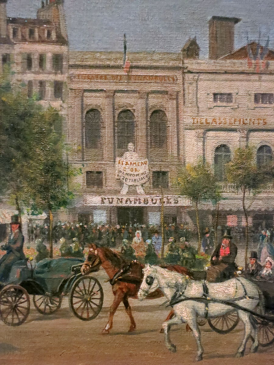 Théâtre des Funambules, boulevard du Temple à Paris en 1862, détail d'un tableau d'Adolphe Martial Potemont